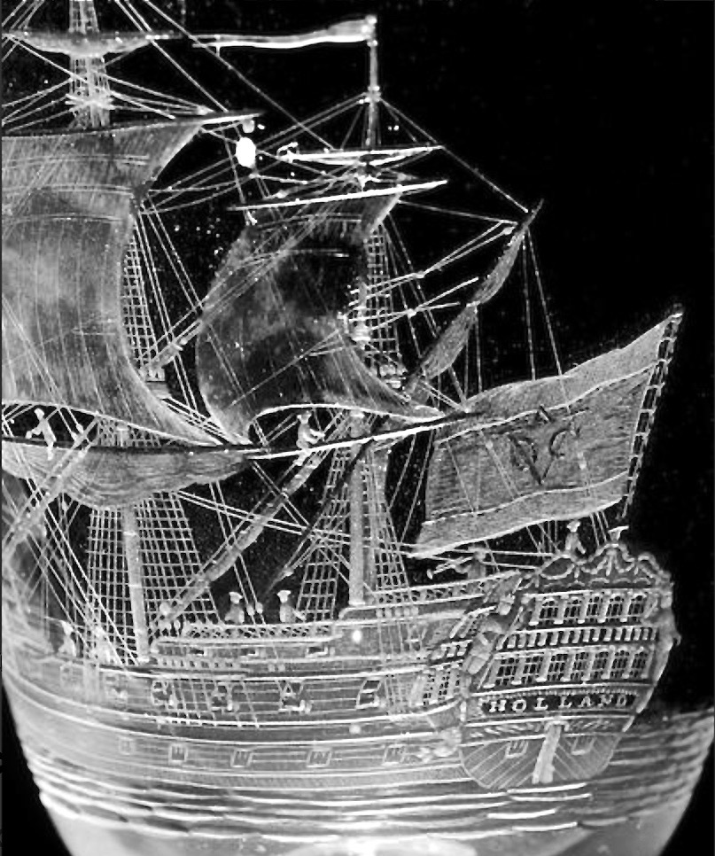 Jacob Sang († 1785) zugeschrieben: Die "Holland" der Niederländischen Ostindienkompanie, gebaut 1771. Gravierung auf einem Trinkglas. Bonhams, London.